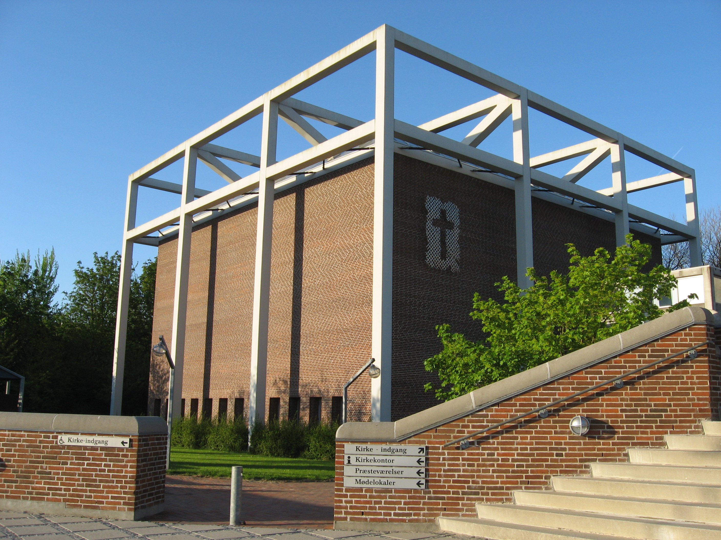 Gellerup Kirke in Gellerup Sogn, Århus, Denmark.